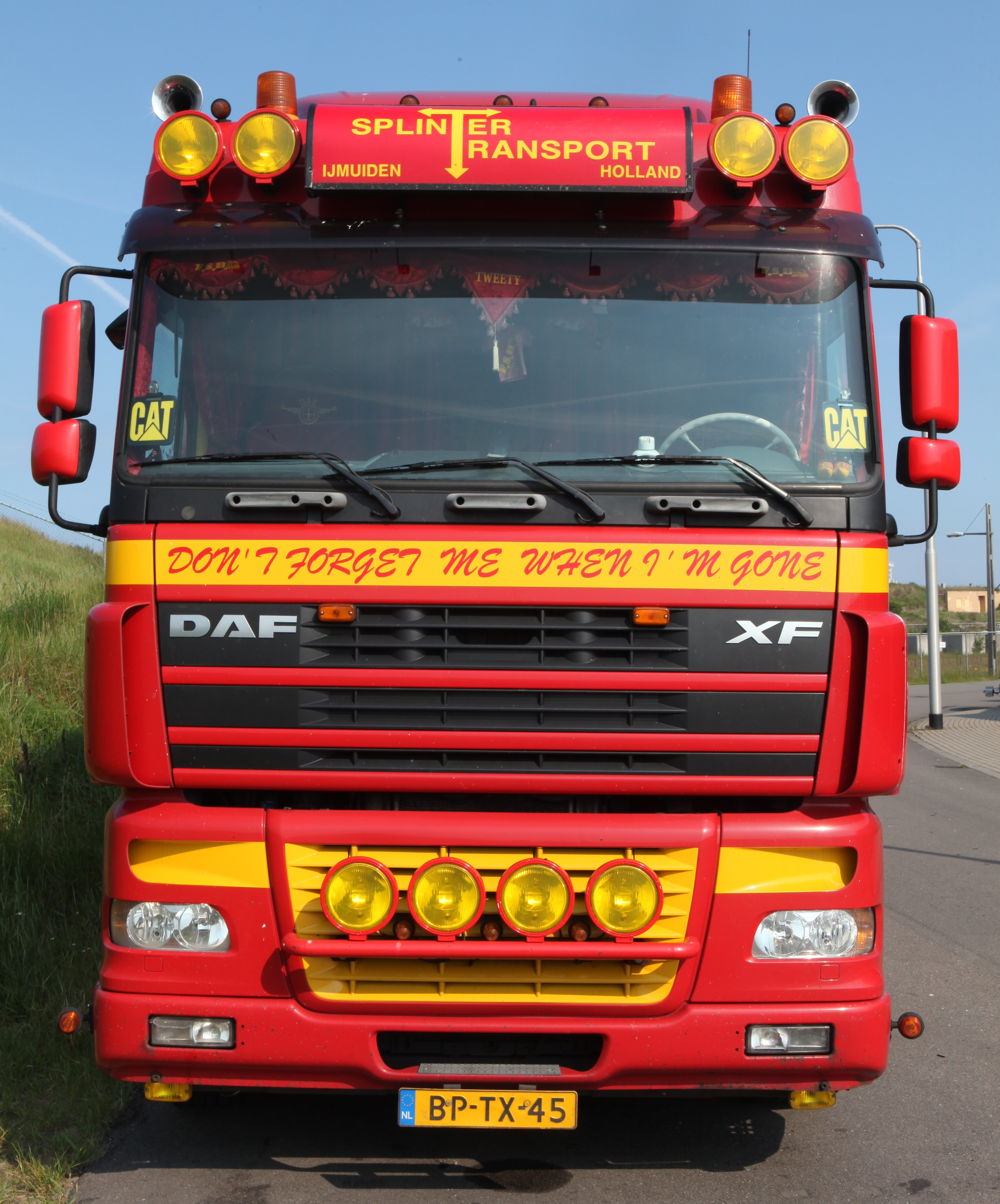 Don't Forget Me When I'm Gone